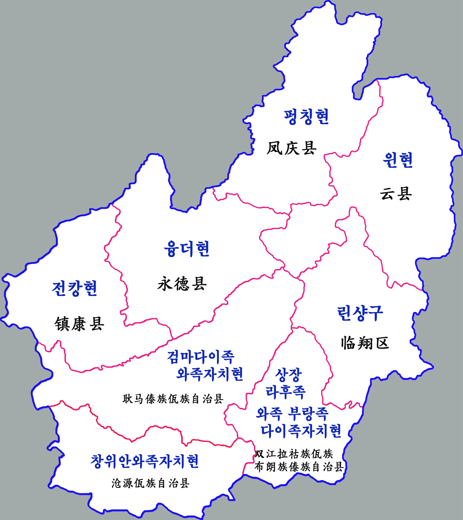 린창시 현급구역